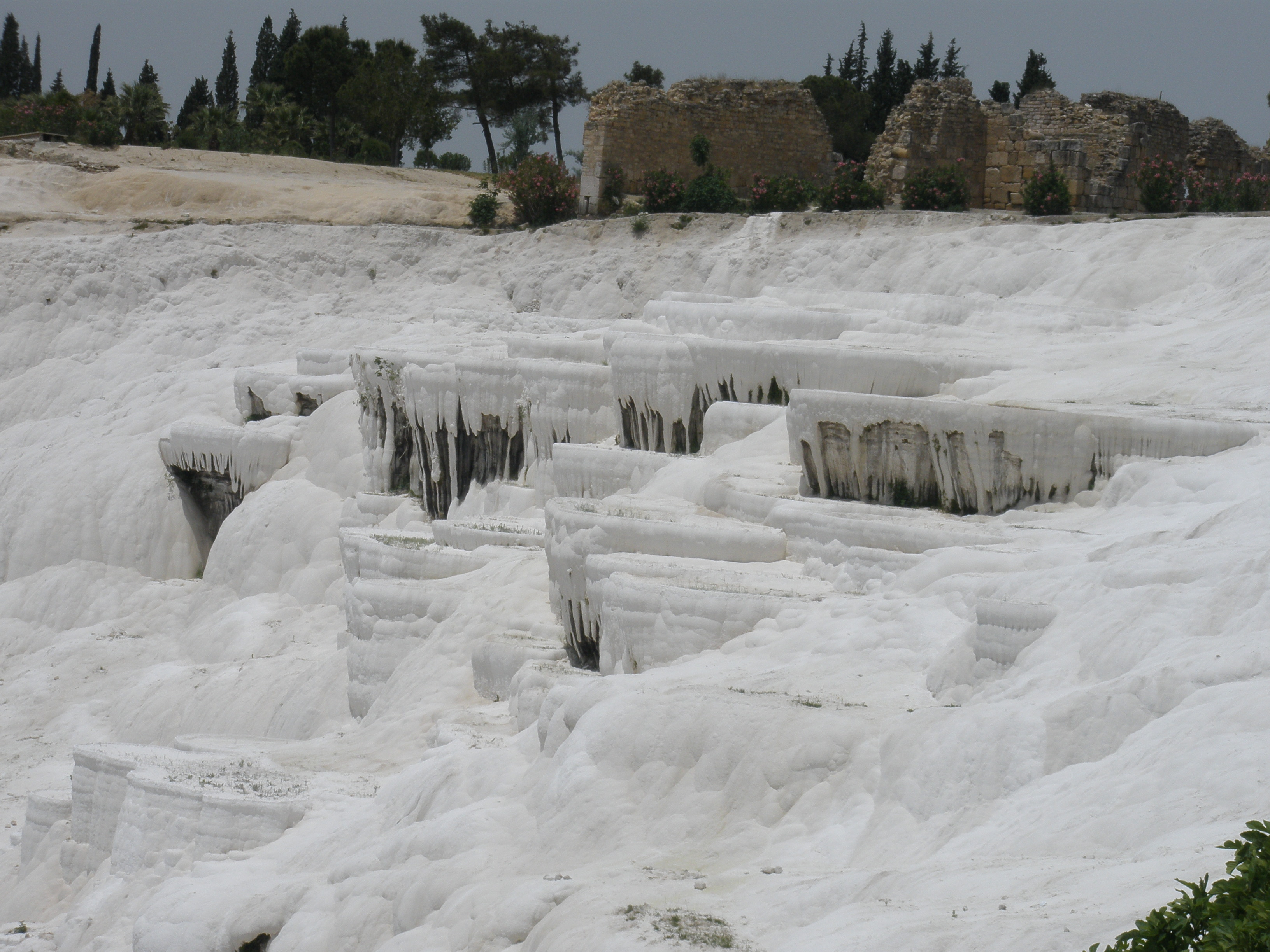 Памуккале